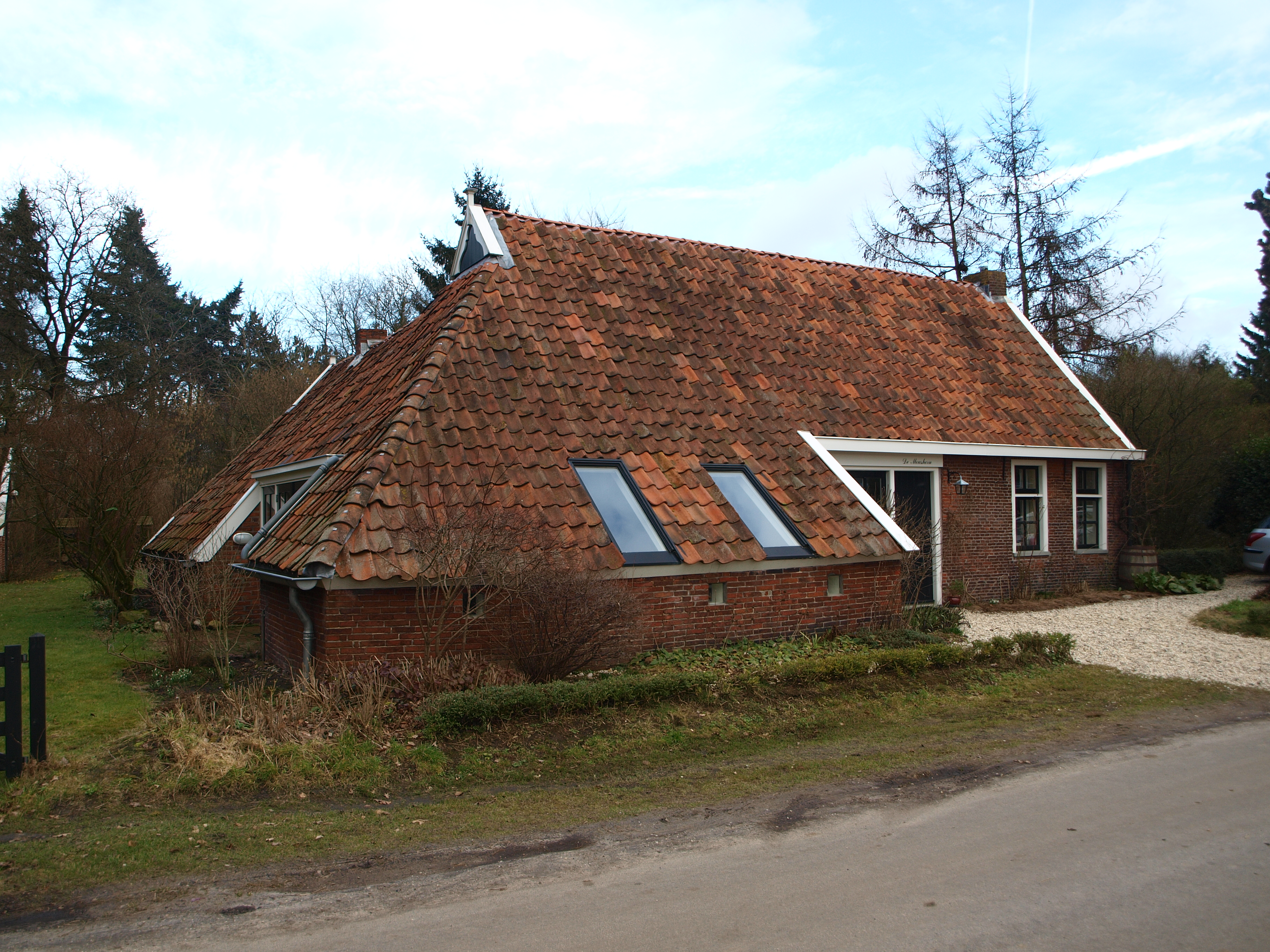 Glimmen Meentweg 15 Moushorn